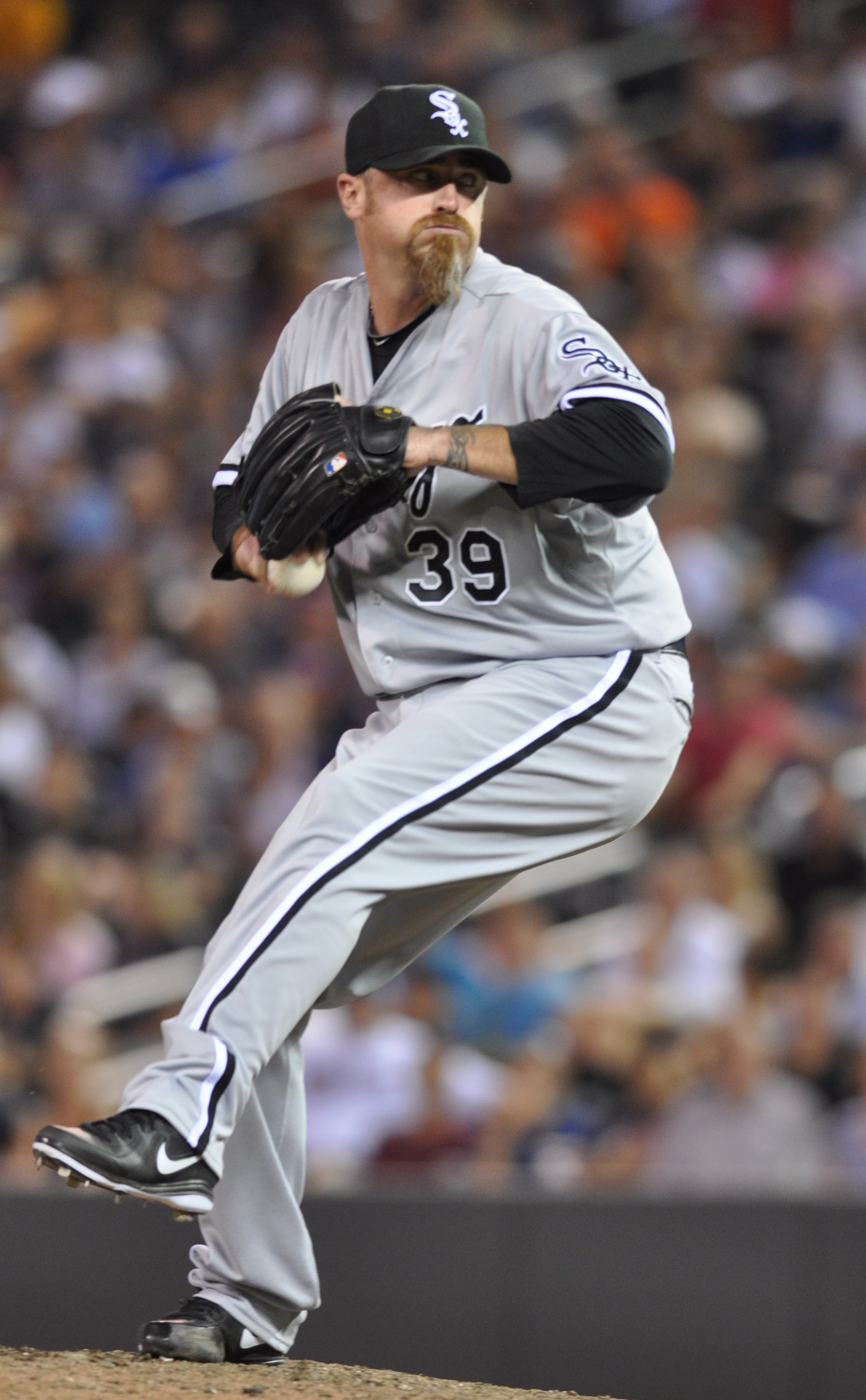 Brett Myers